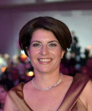 Liz cropped